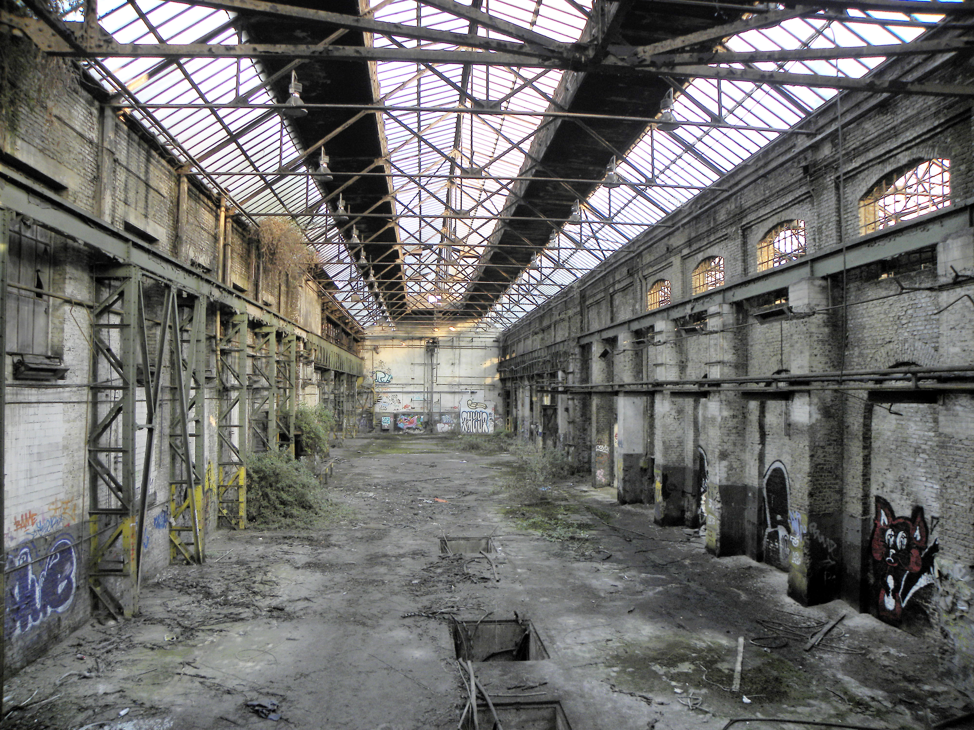 Blick in die Fabrikhalle von KHD anno 2014